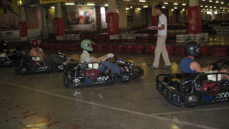 корпоративное меропритие - езда на картах. Для иллюстрации статьи "деловой туризм". Обрезал и заретушировал логотипы.